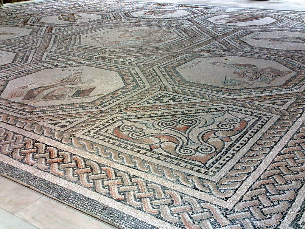 Klio und Urania auf dem röm. Mosaik in Vichten, selbst fotografiert, April 2006, --Xocolatl 11:20, 22 April 2006 (UTC)